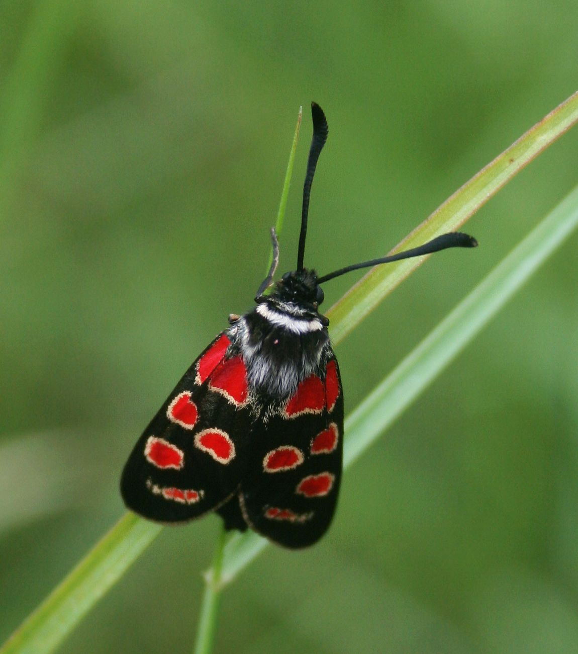 Krainer Widderchen (Zygaena carniolica), Widderchen (Zygaenidae) - Slowenien/Slovenija/Slovenia: Primorska, Podgorje